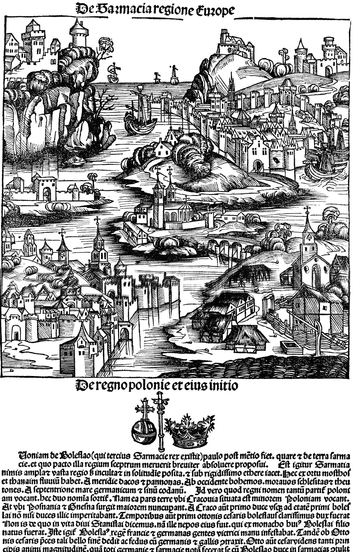 Regno Polonie z Liber chronicarum